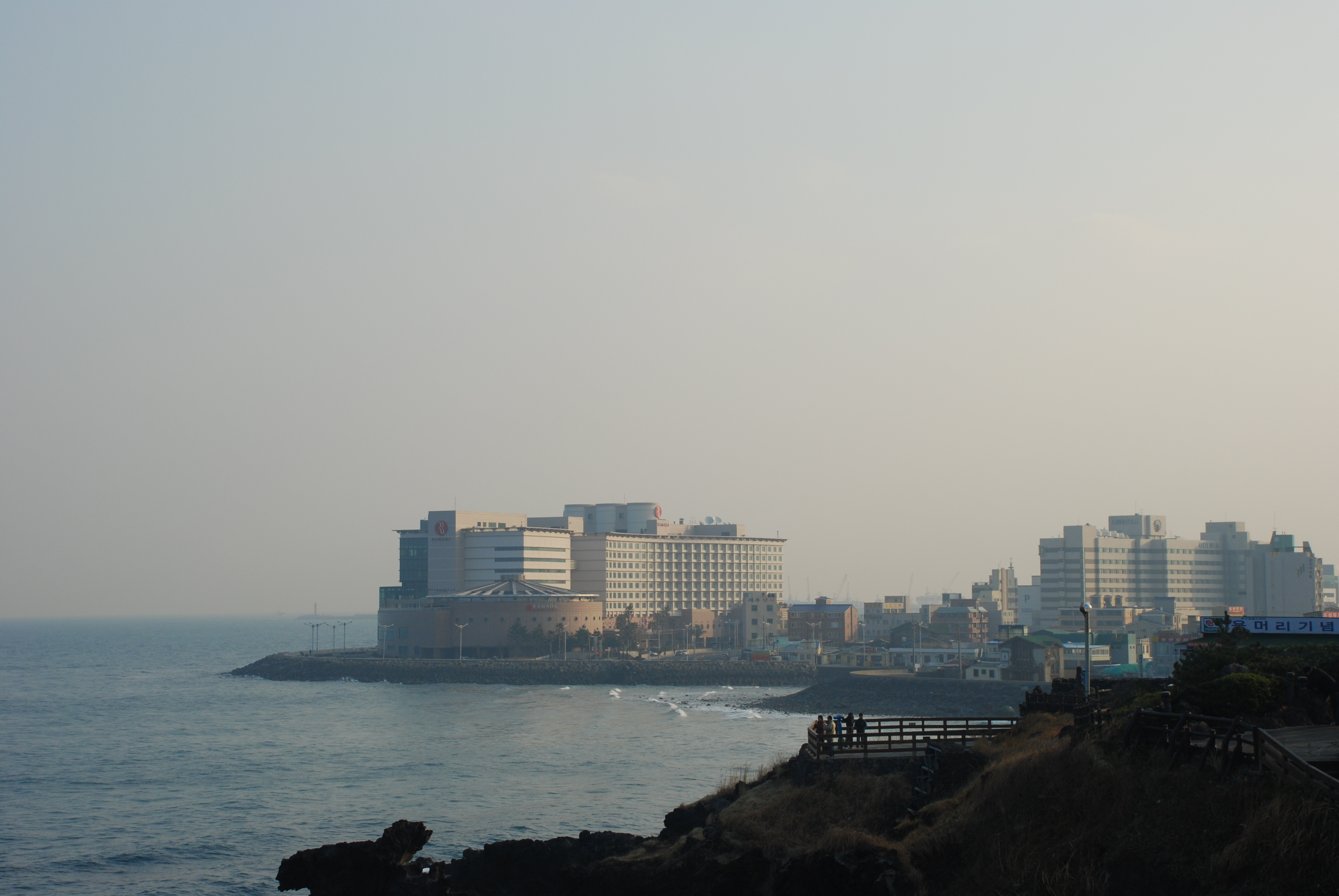 2007 Chejudao Korea